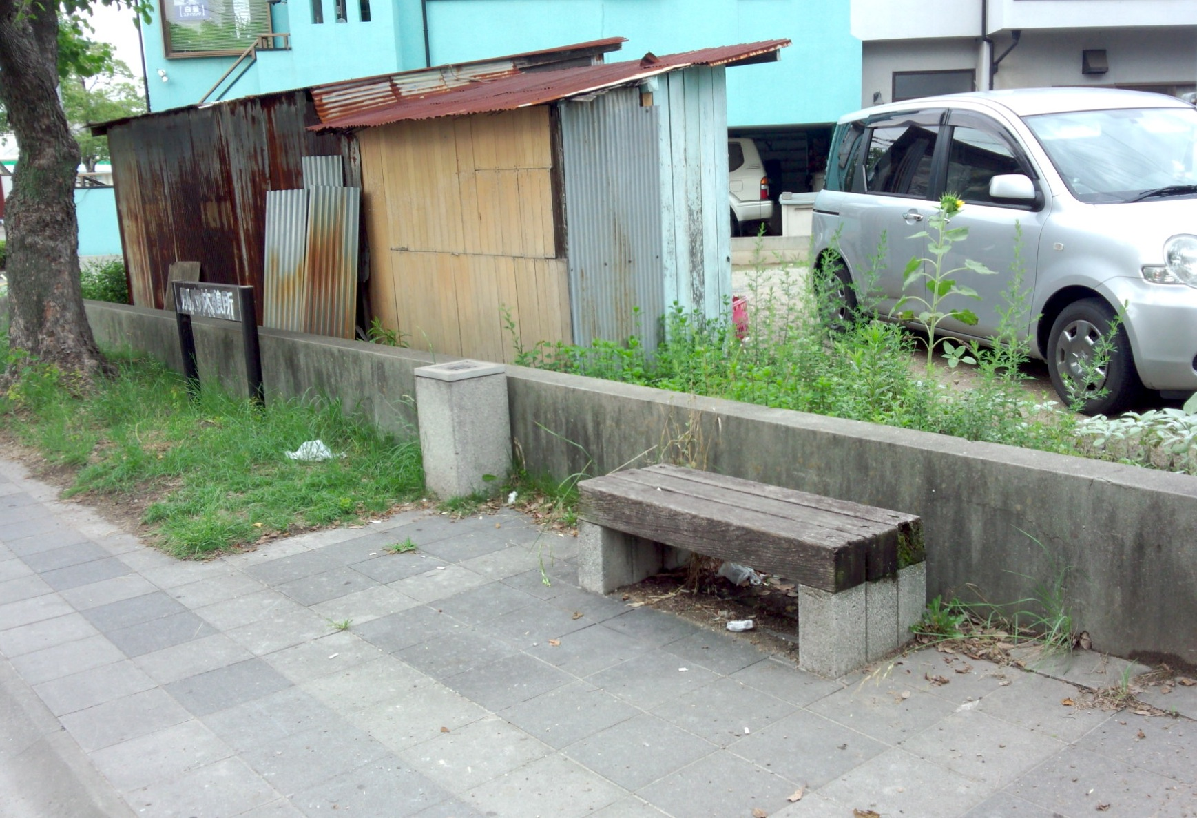 別府口駅（別府鉄道）